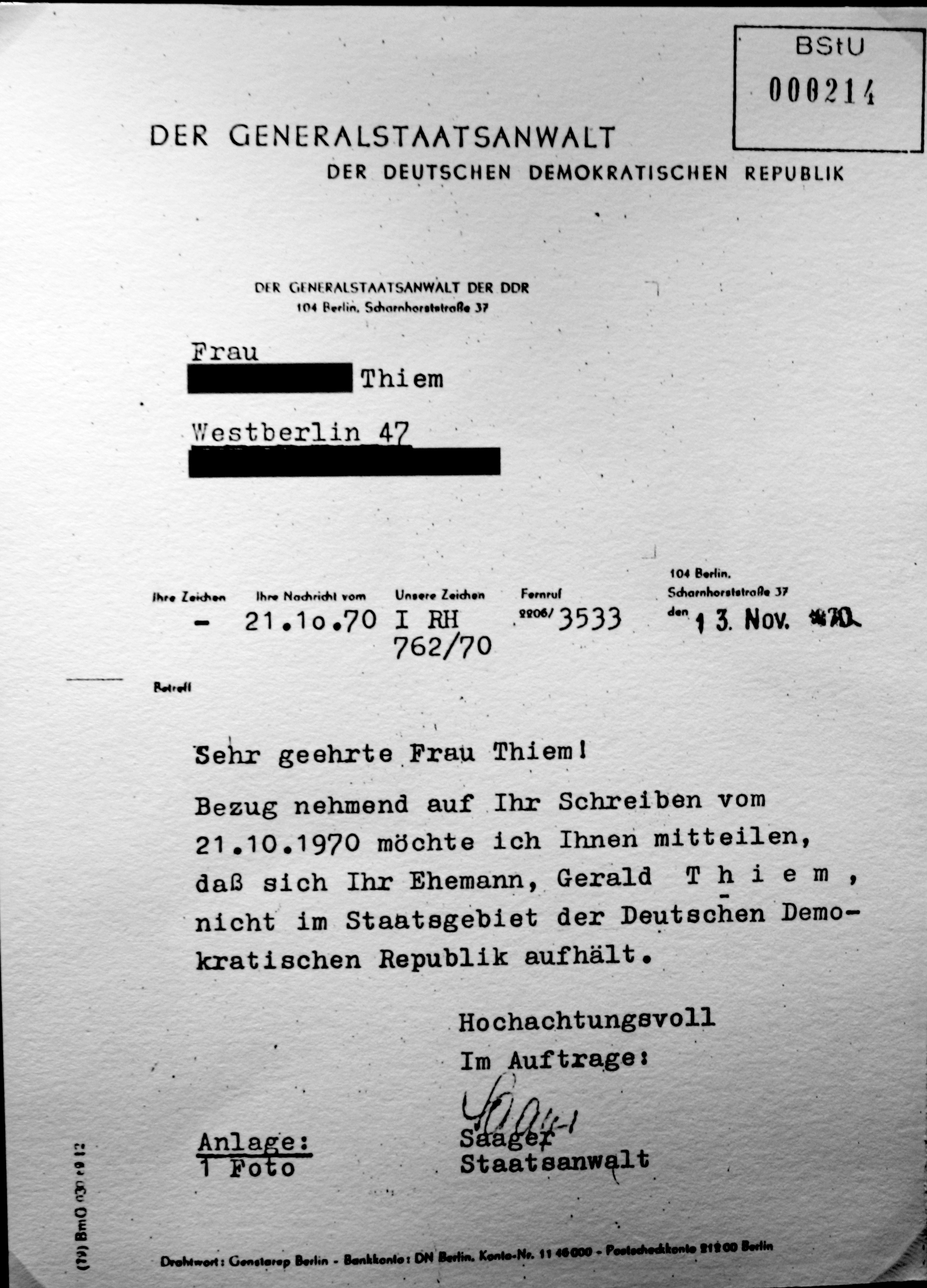 Gerald Thiem Responseletter